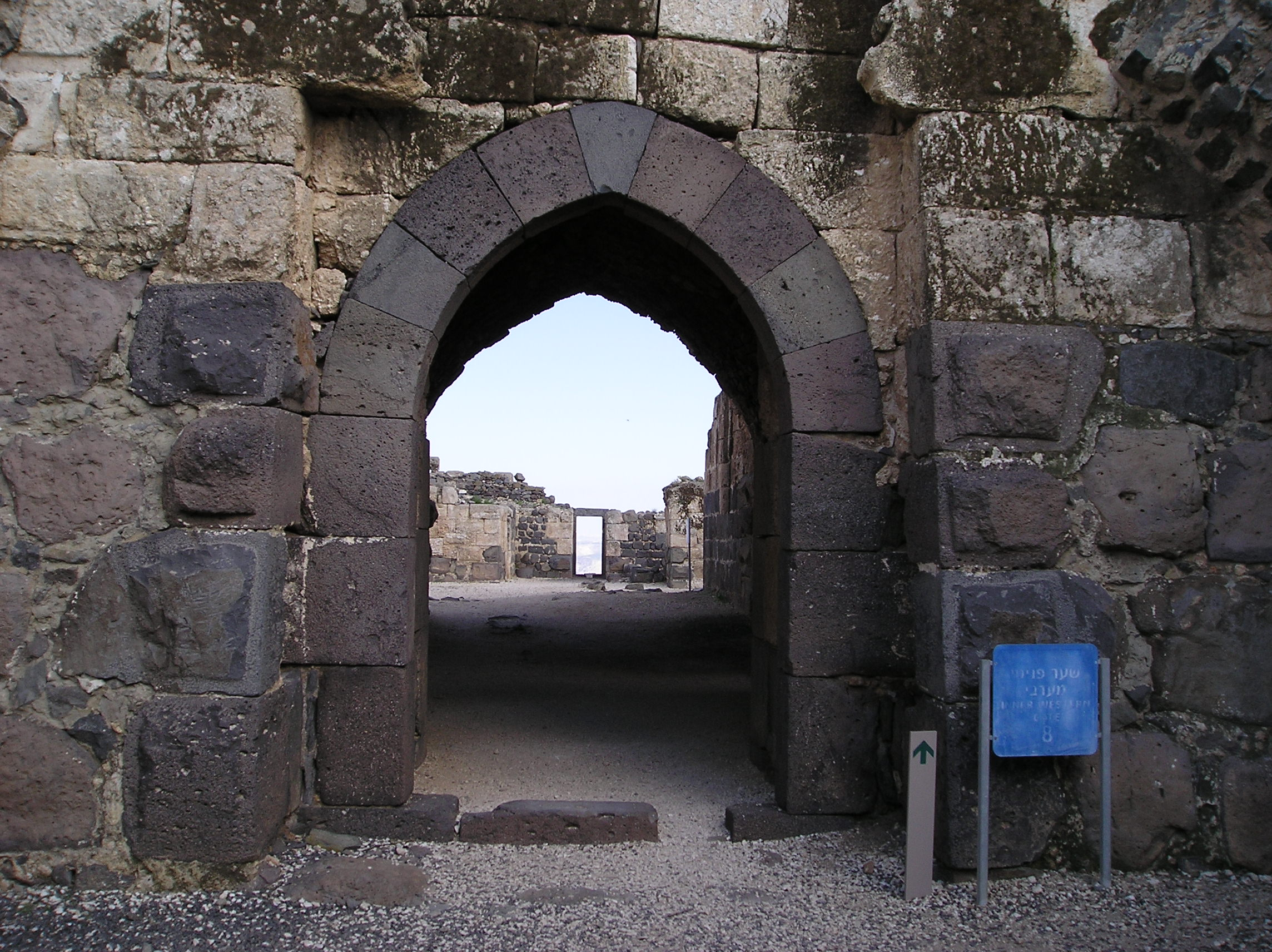 Belvoir (twierdza) - Teren izraelskiego parku narodowego. Zachodnia brama do twierdzy wewnętrznej.